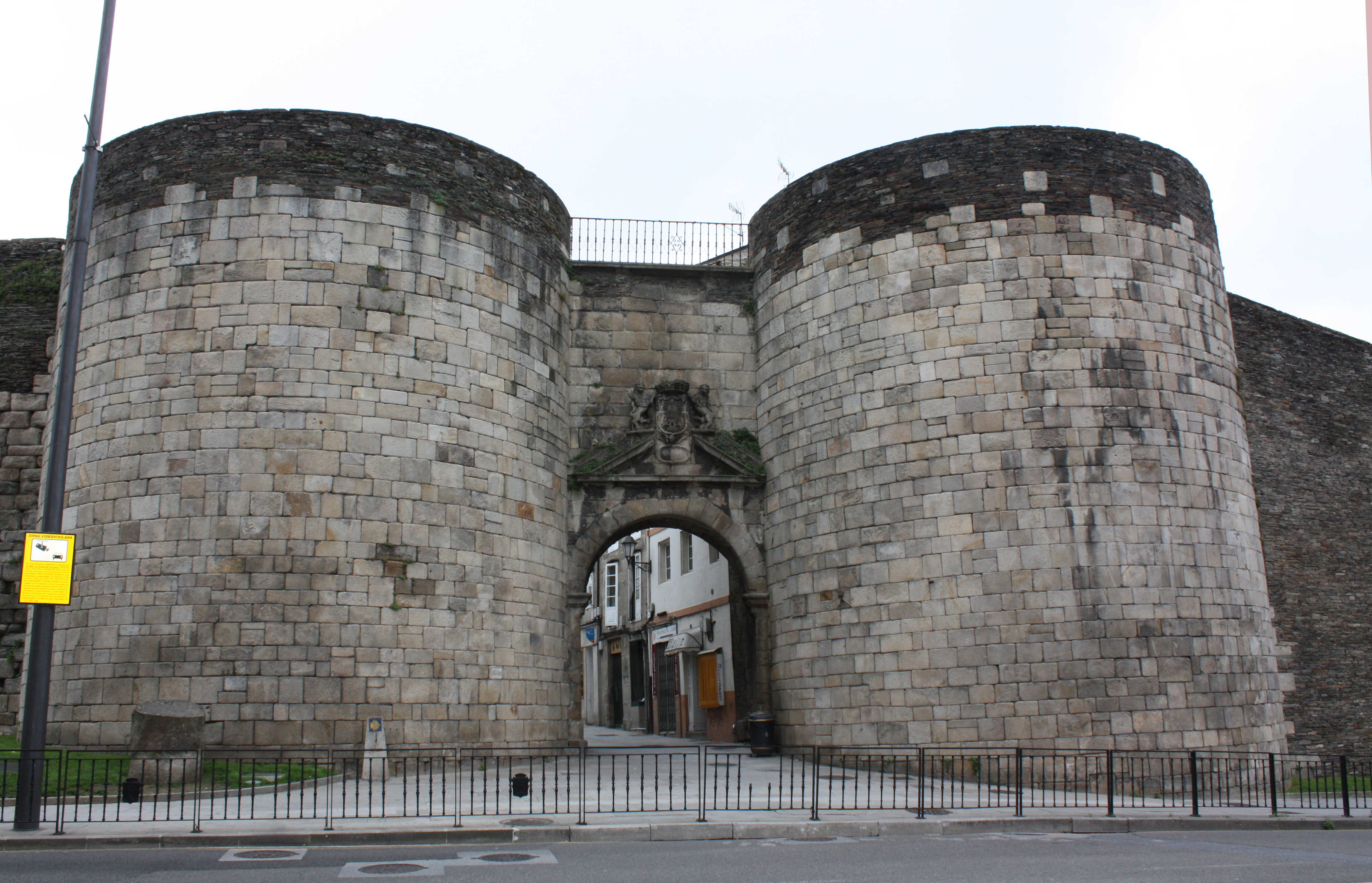 Porta de San Pedro ou Toledana, na muralla de Lugo